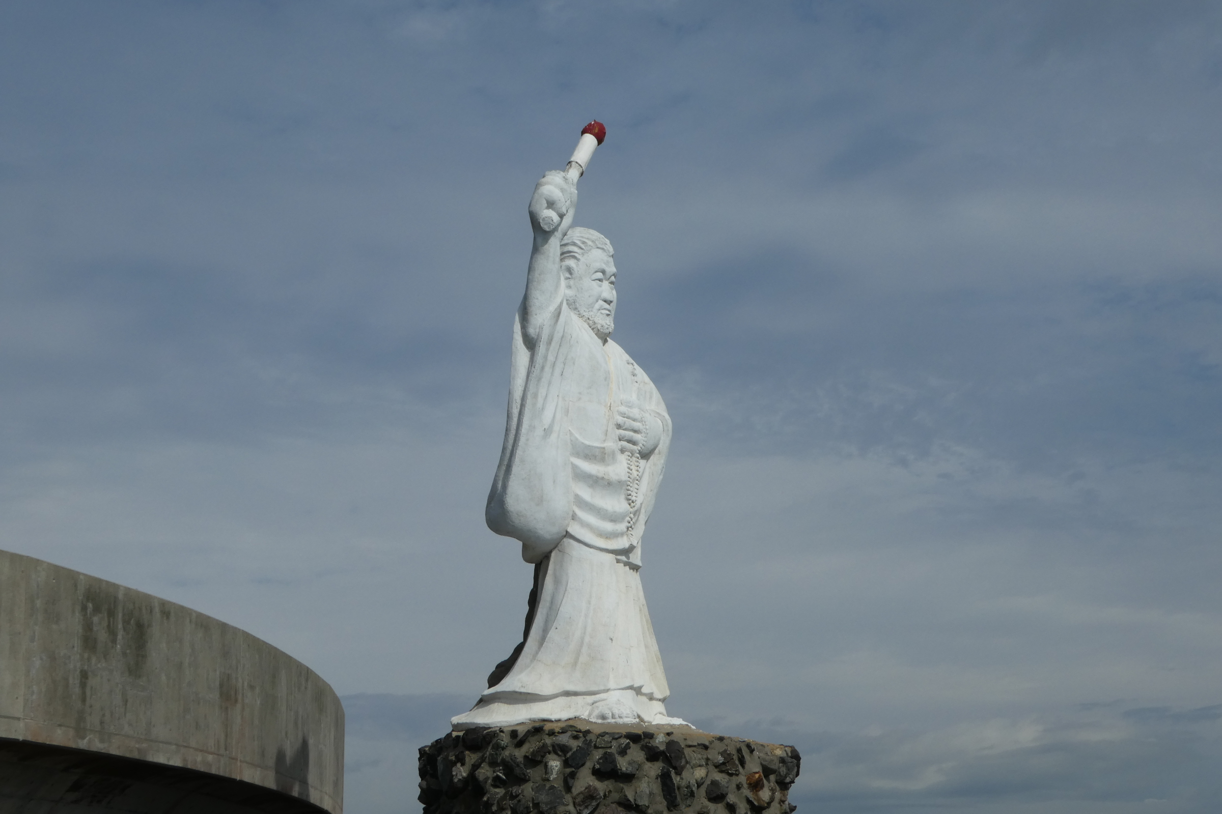 福岡県北九州市門司区部埼に立つ僧 清虚（せいきょ）の像。